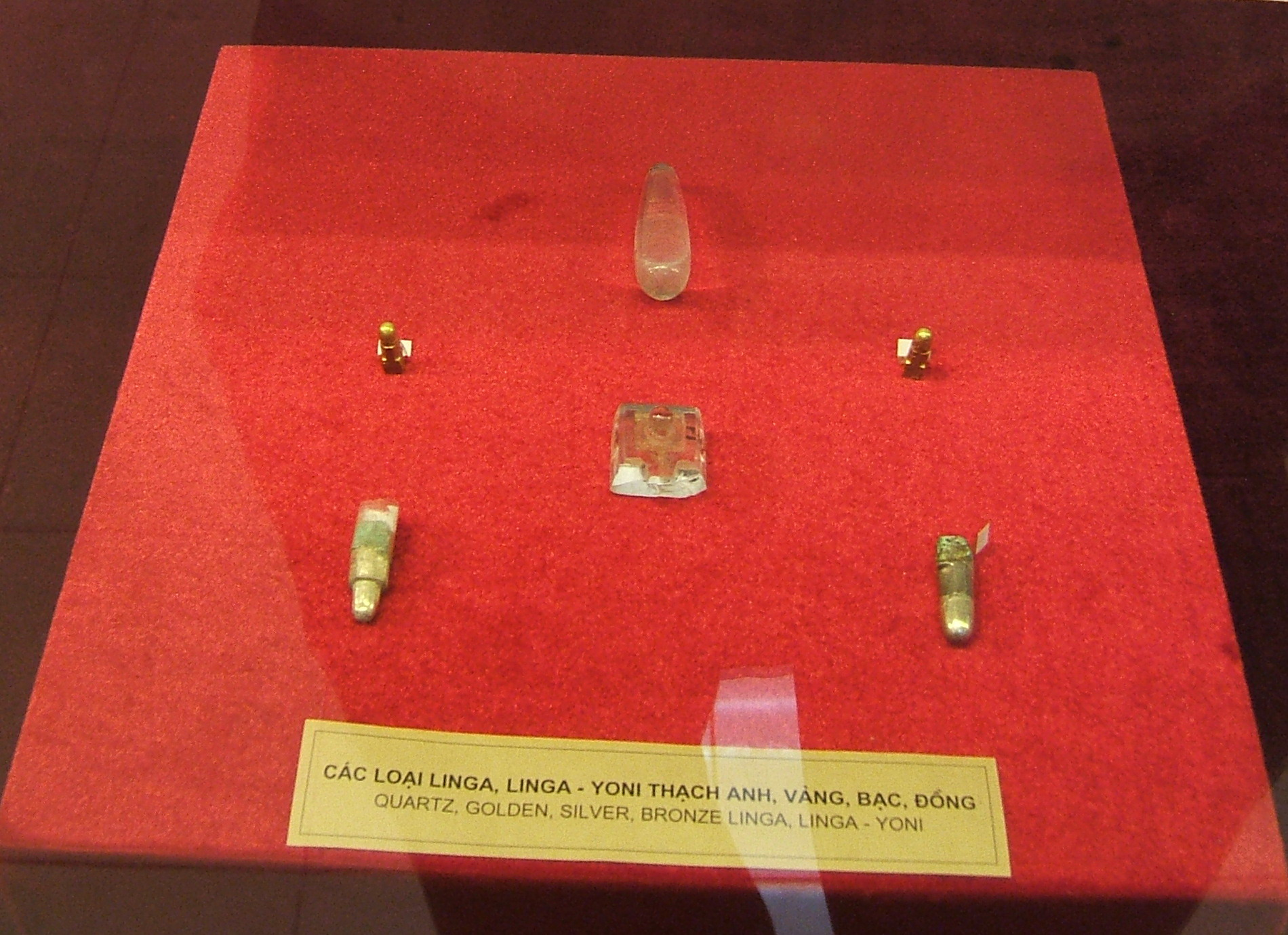 Các loại linga và linga-yoni bằng đồng, vàng, bạc, đá thạch anh rất nhỏ tại Thánh địa Cát Tiên, Lâm Đồng, Việt Nam Bronze, golden, silver, quartz linga and linga-yoni in Cát Tiên sanctuary, Lâm Đồng province, Việt Nam